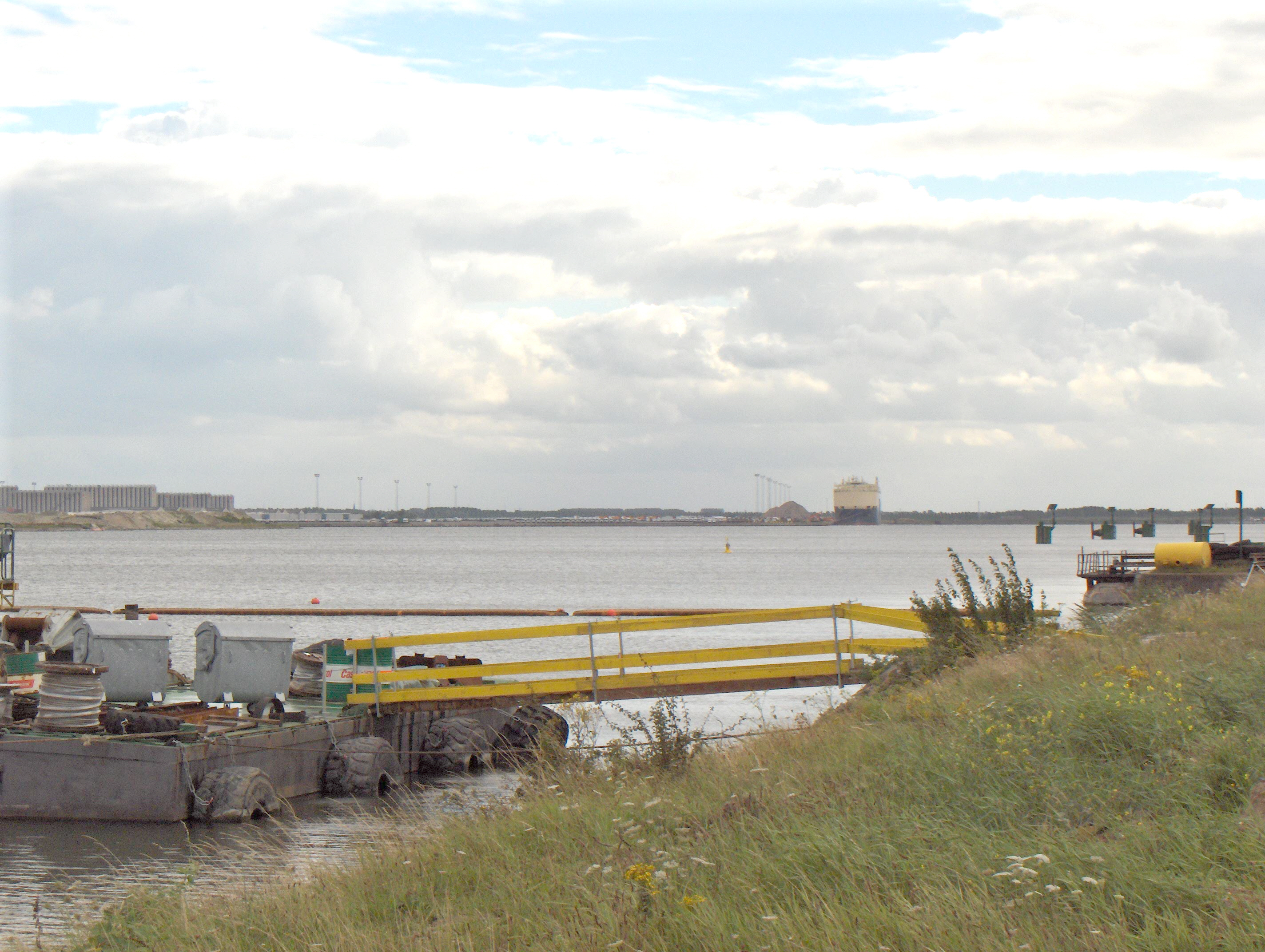 Bild: Doeldok, Hafen von Antwerpen (Waaslandhaven, Gemeinde Beveren), Blick vom Hogendijk (Mitte des Doeldoks)(südwärts) Fotograf: Friedrich Tellberg Datum: 7. August 2005